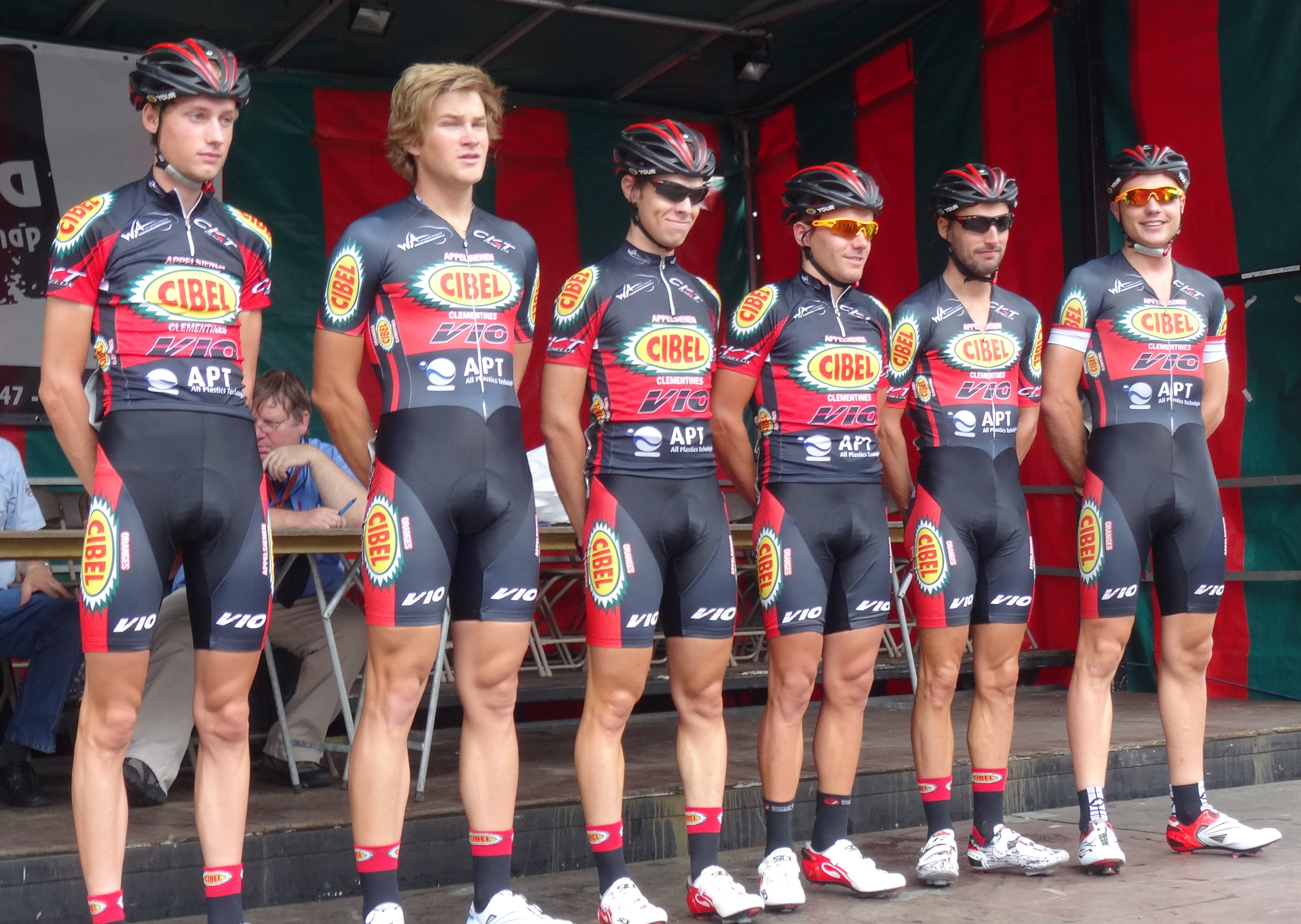 Reportage photographique réalisé le dimanche 10 août à l'occasion du départ et de l'arrivée de la Flèche du port d'Anvers 2014 à Merksem (Anvers), Belgique.